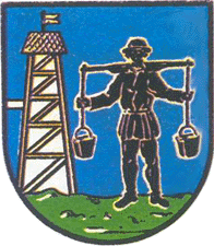 Herb miasta Borysław